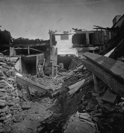 Quartier Saint-Cyprien. Juin 1875. Vue d'ensemble d'habitations détruites par l'inondation des 23 et 24 juin. Au premier plan débris de bois ; au second plan bâtiment à étages délabrés ; fissures.